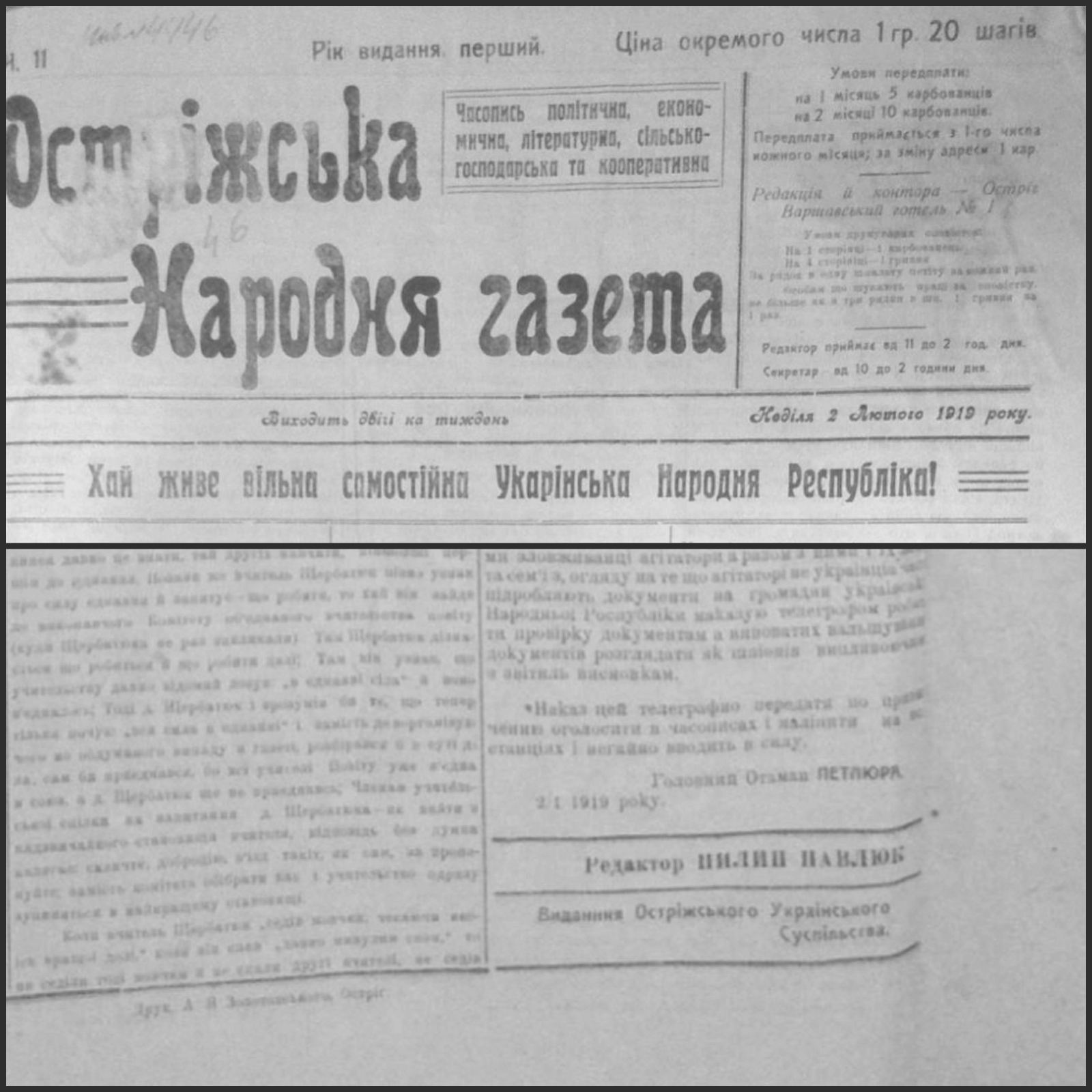 Острижська народна газета